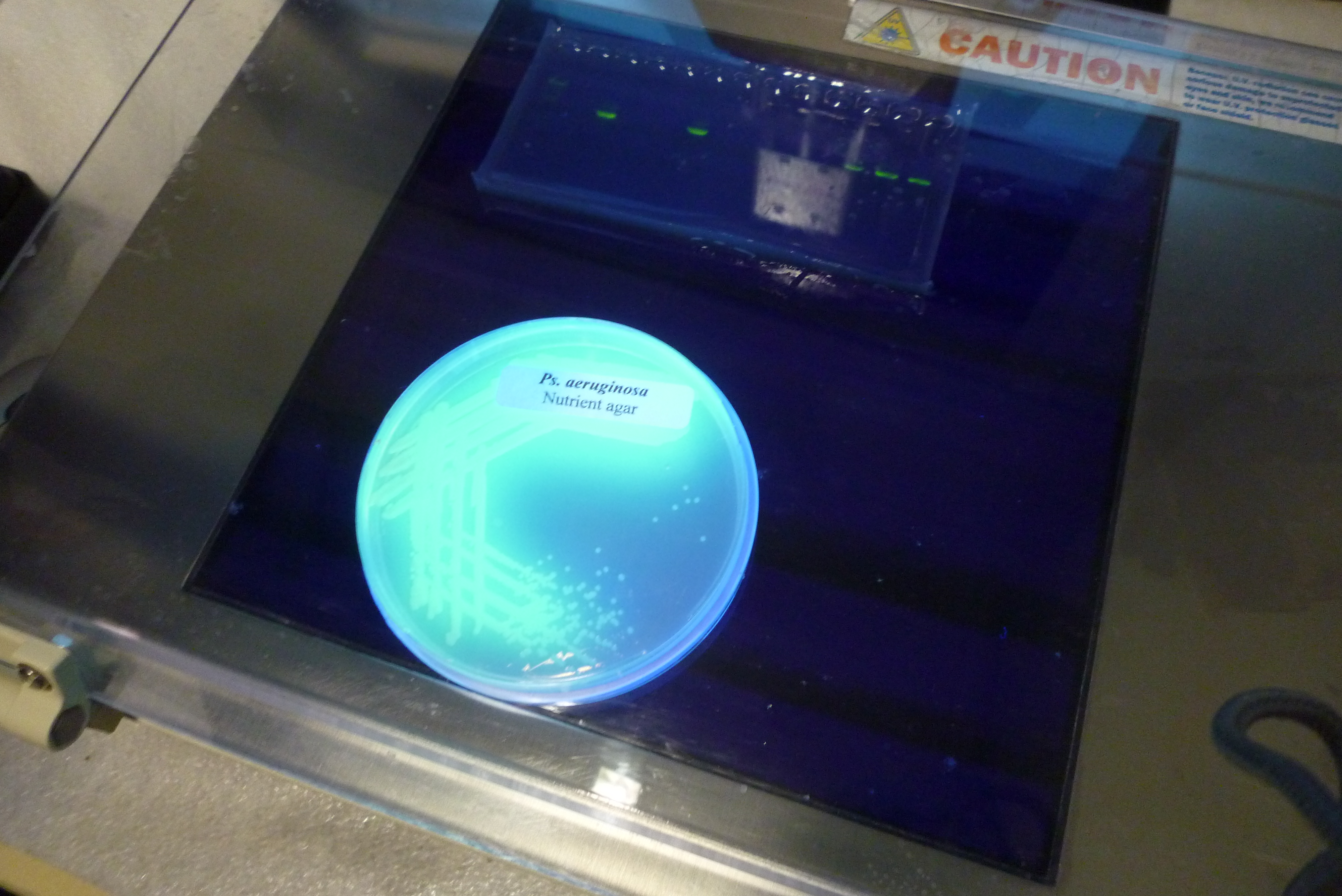 中文（香港）: Pseudomonas aeruginosa fluorescence under UV illumination